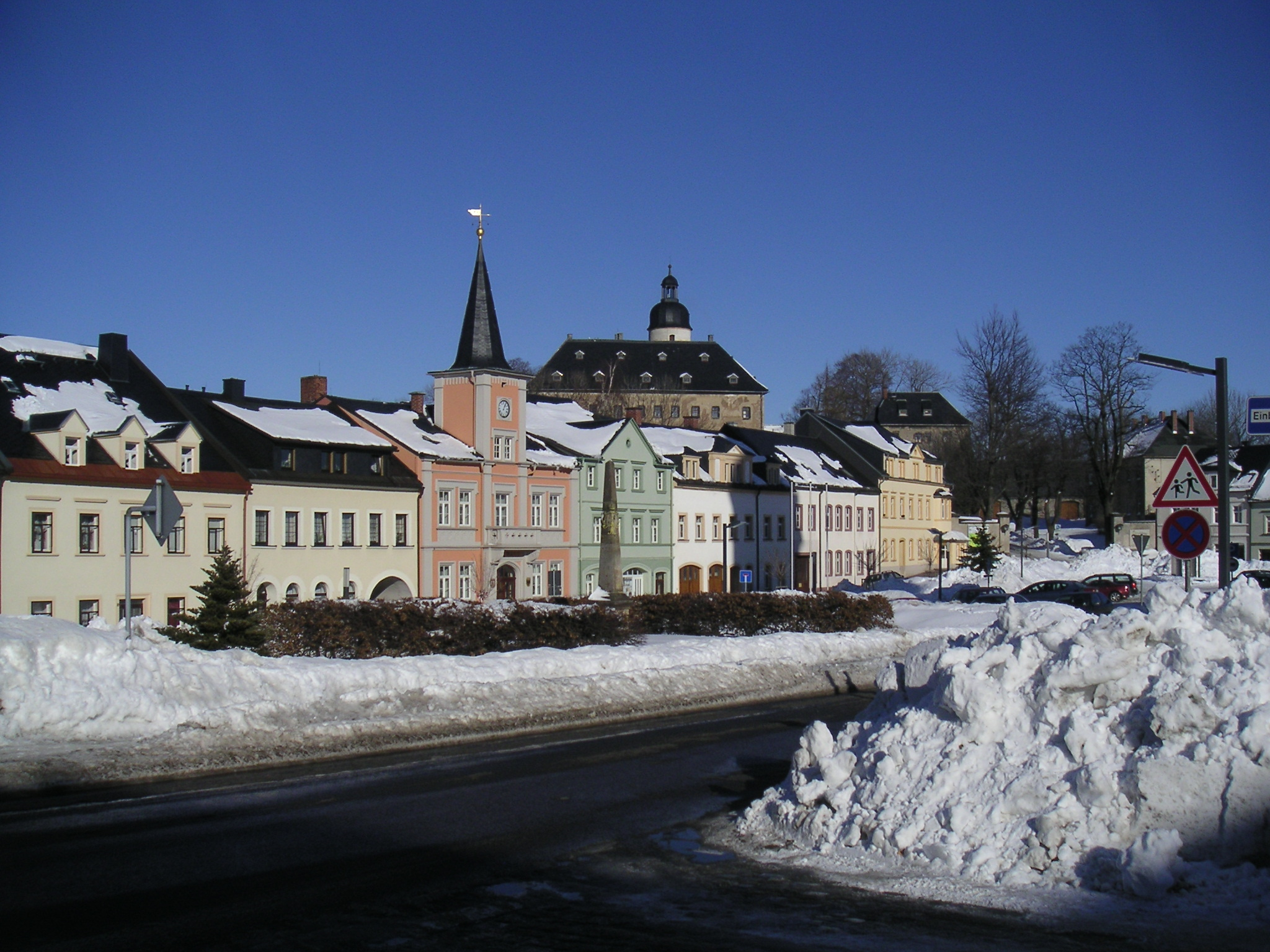 Frauenstein/Sachsen, Blick auf Rathaus und Schloss